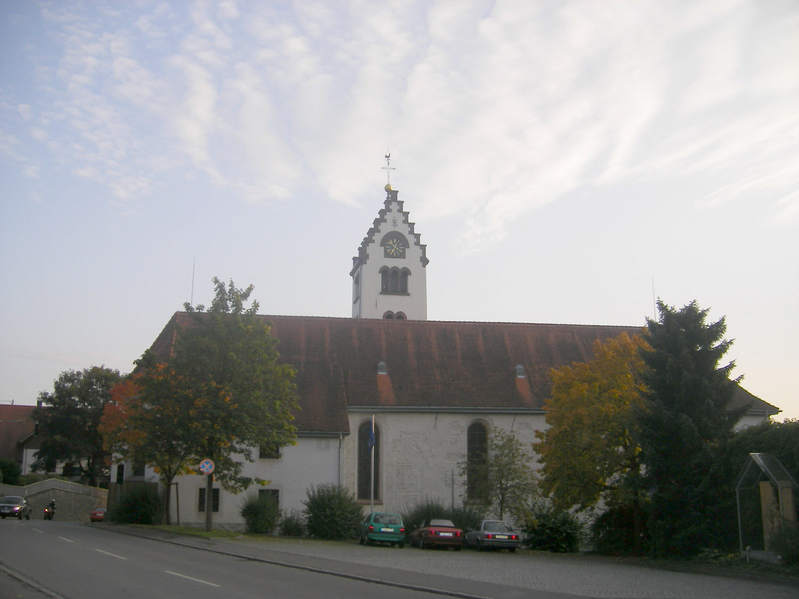 Kirche St. Martin, Ortsteil Kirchdorf, Gemeinde Brigachtal, Schwarzwald-Baar-Kreis